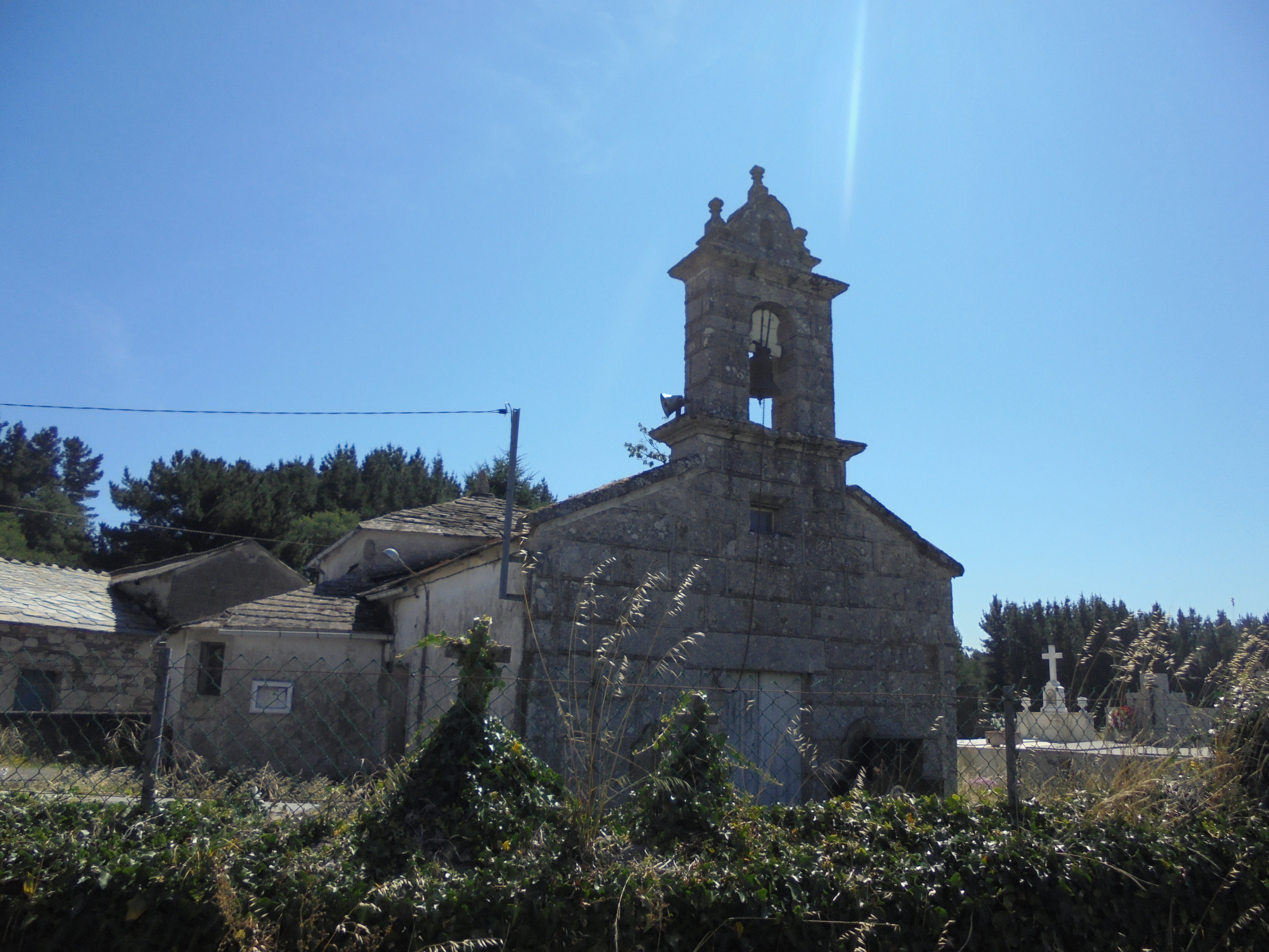 Igrexa parroquial de vilachá ( O Corgo)